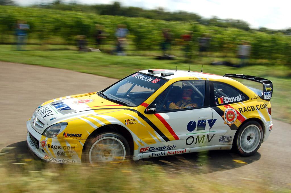 François Duval en test avec la Xsara WRC Kronos avant le rallye d'Allemagne 2007